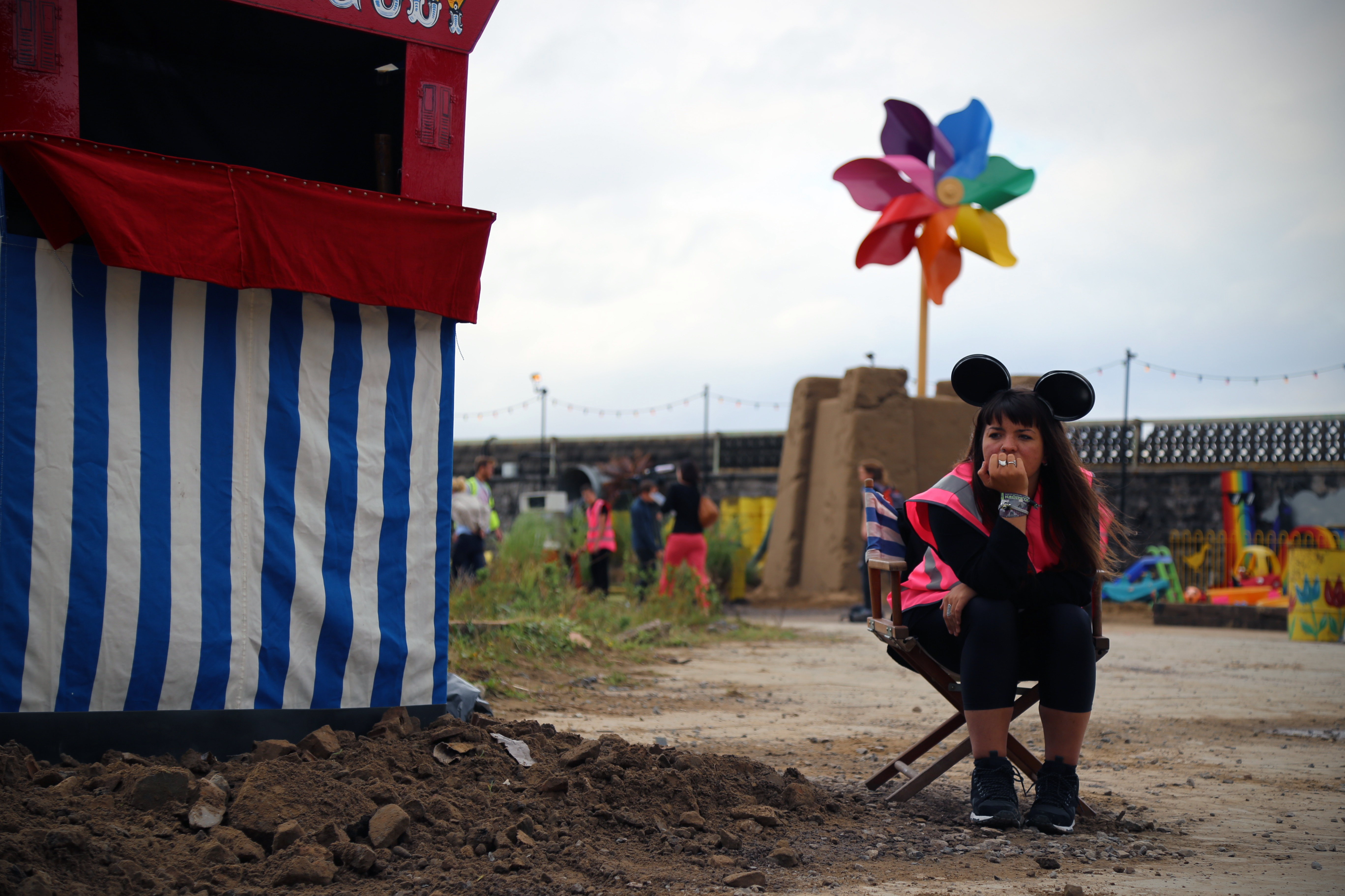 Dismaland, Weston-super-Mare